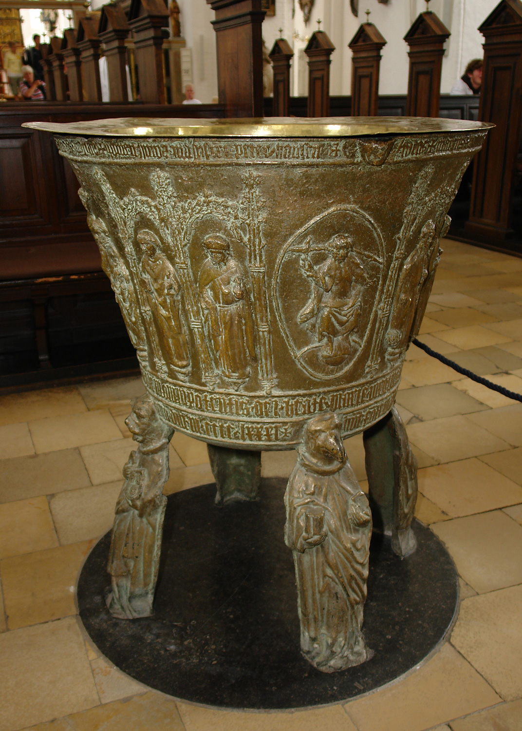 Dom zu Århus: Taufbecken aus Bronze. 1481 vom Flensburger Glockengießer Peter Hansen erstellt, gespendet von Bischof Jens Iversen Lange. In gotischer Umrahmung die Szenen Abendmahl, Kreuzigung, Christus als Weltenrichter und die Marienkrönung; zwischen den Szenen neun Apostel. Die Füße in Form der vier Evangelistensymbole.)